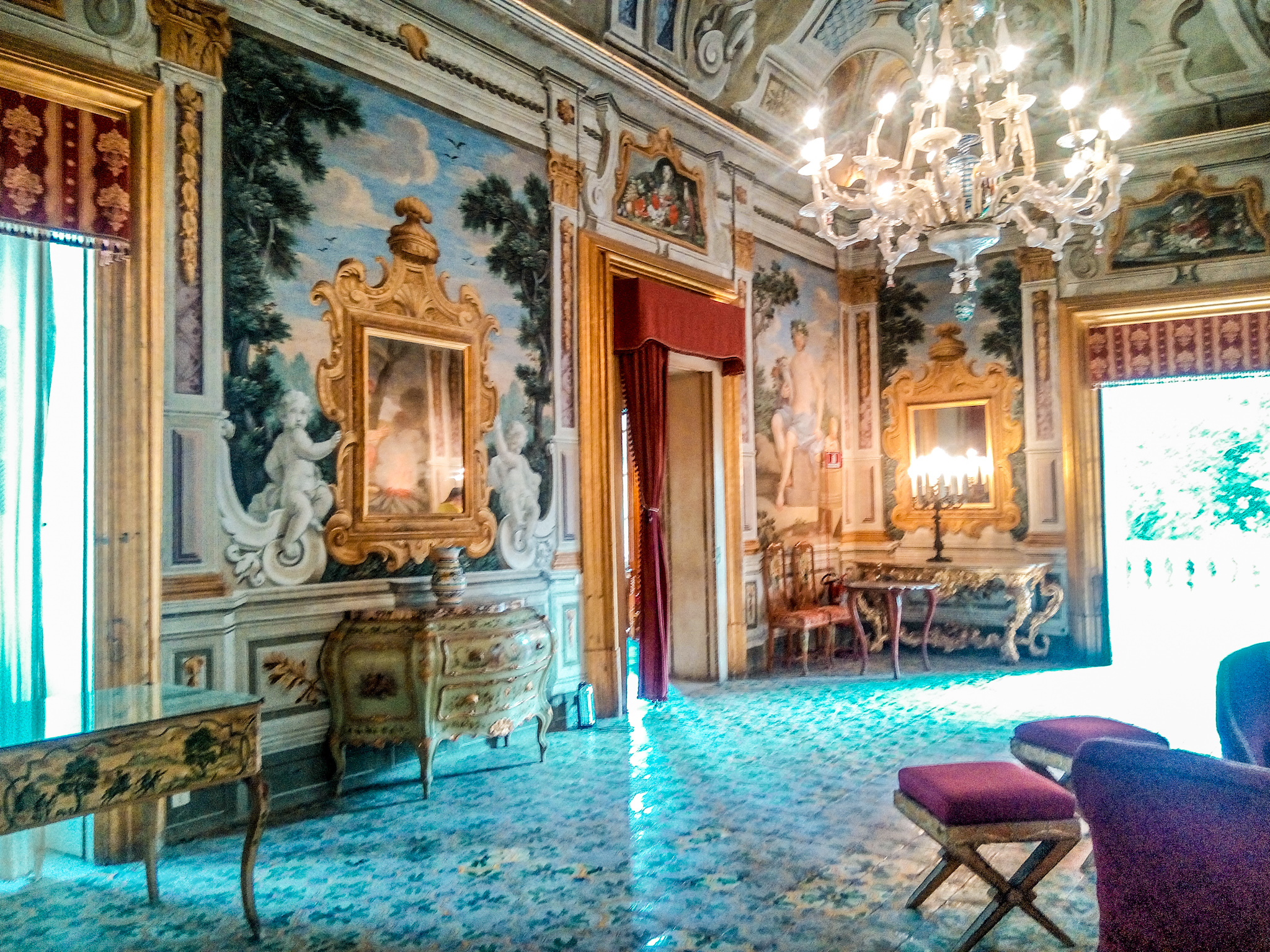 Villa Niscemi This is a photo of a monument which is part of cultural heritage of Italy.